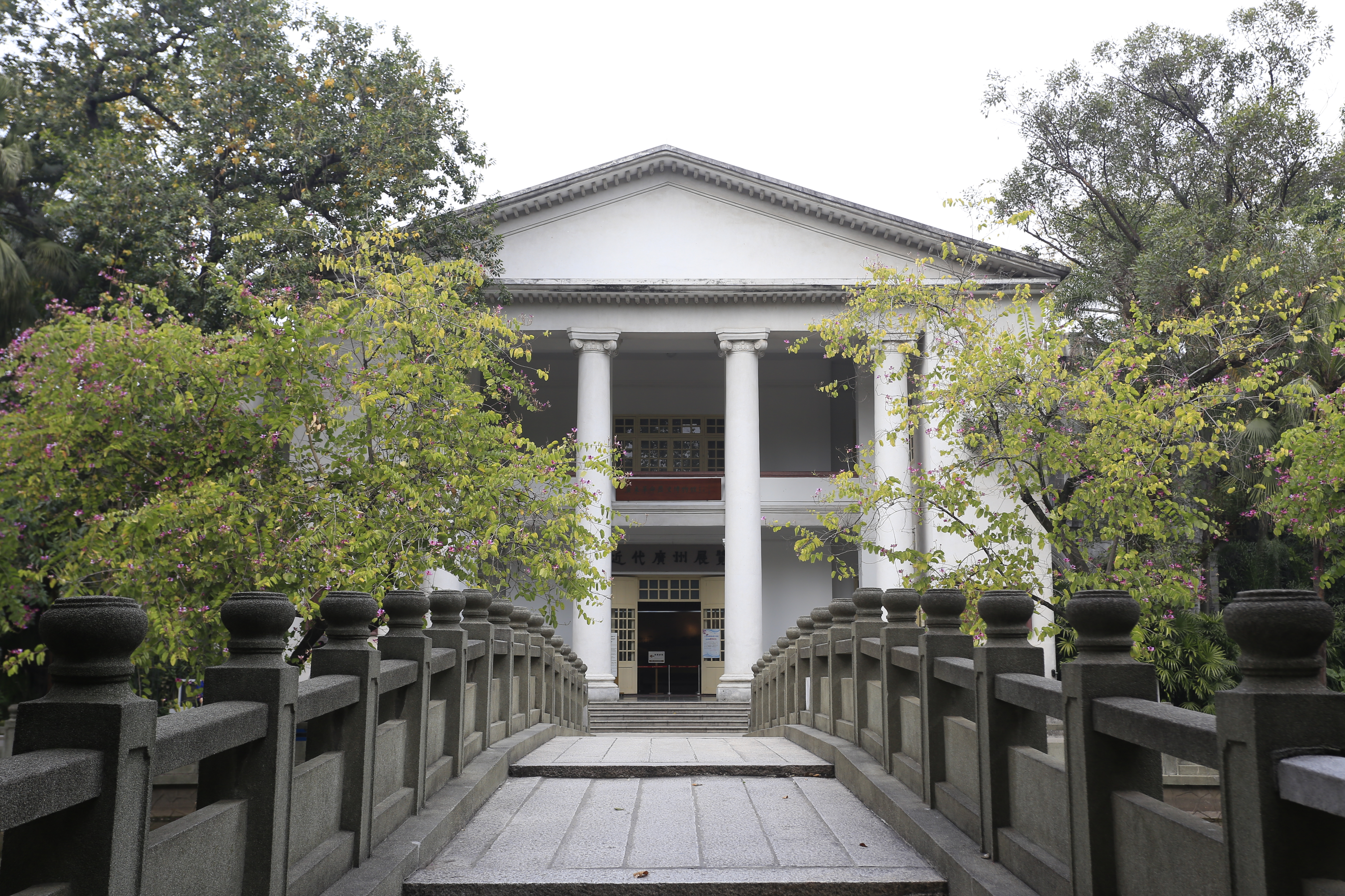 广州广东咨议局旧址（广东革命历史博物馆、广州近代史博物馆）